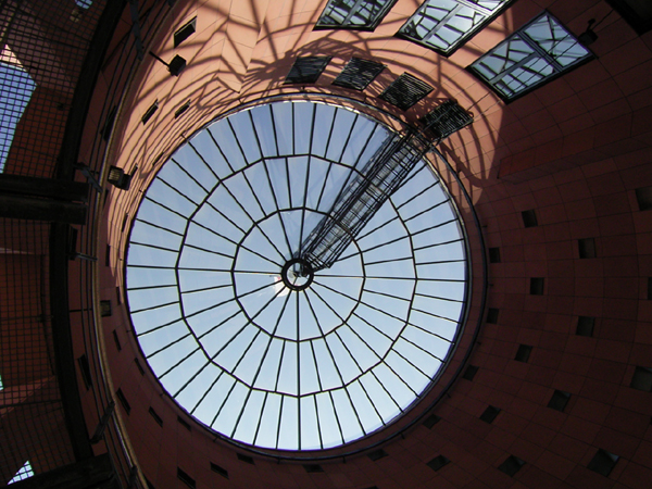 Rotunde Pfalztheater, Kaiserslautern, Deutschland